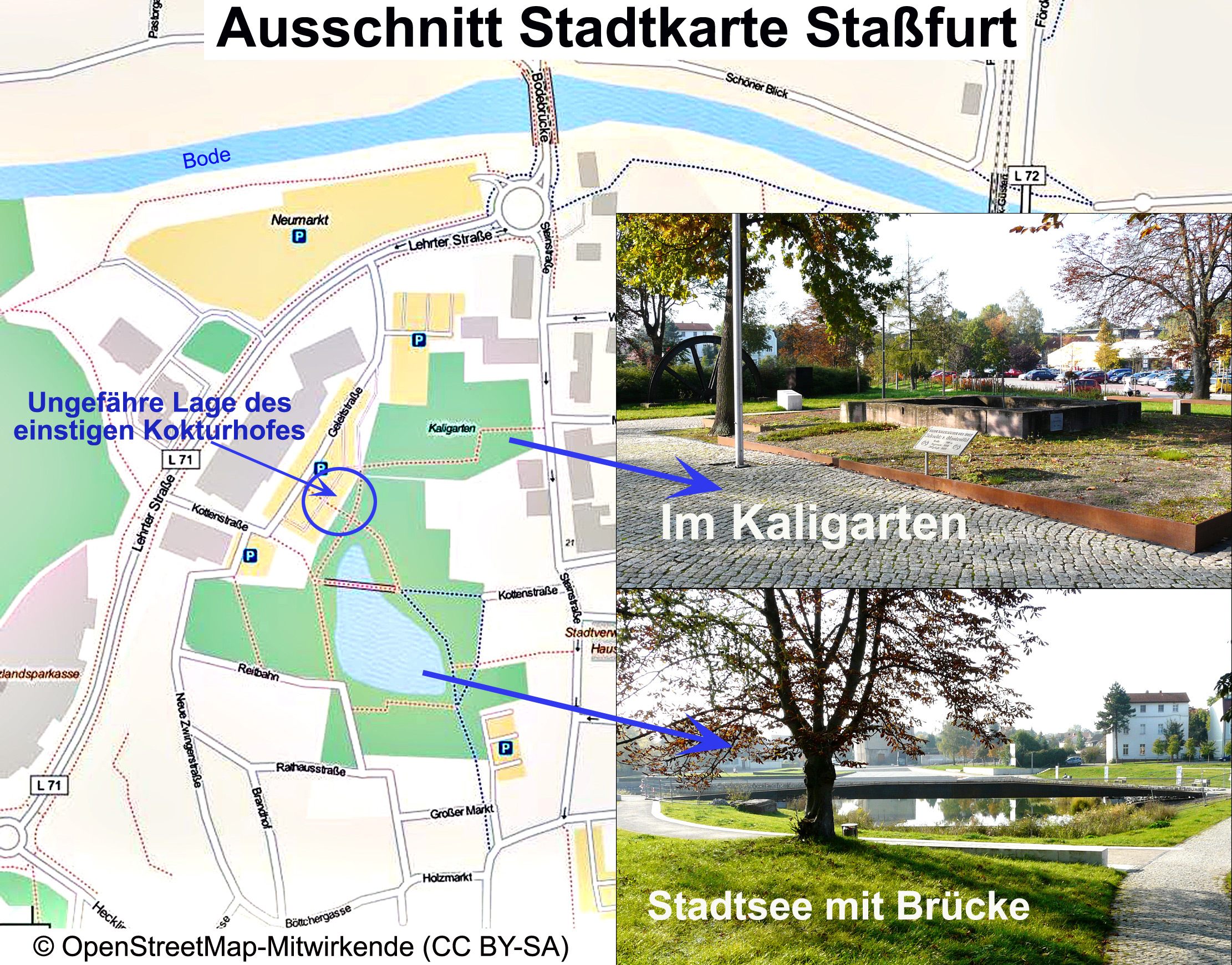 Ungefähre Lage des Salinegeländes der stillgelegten Saline Staßfurt.